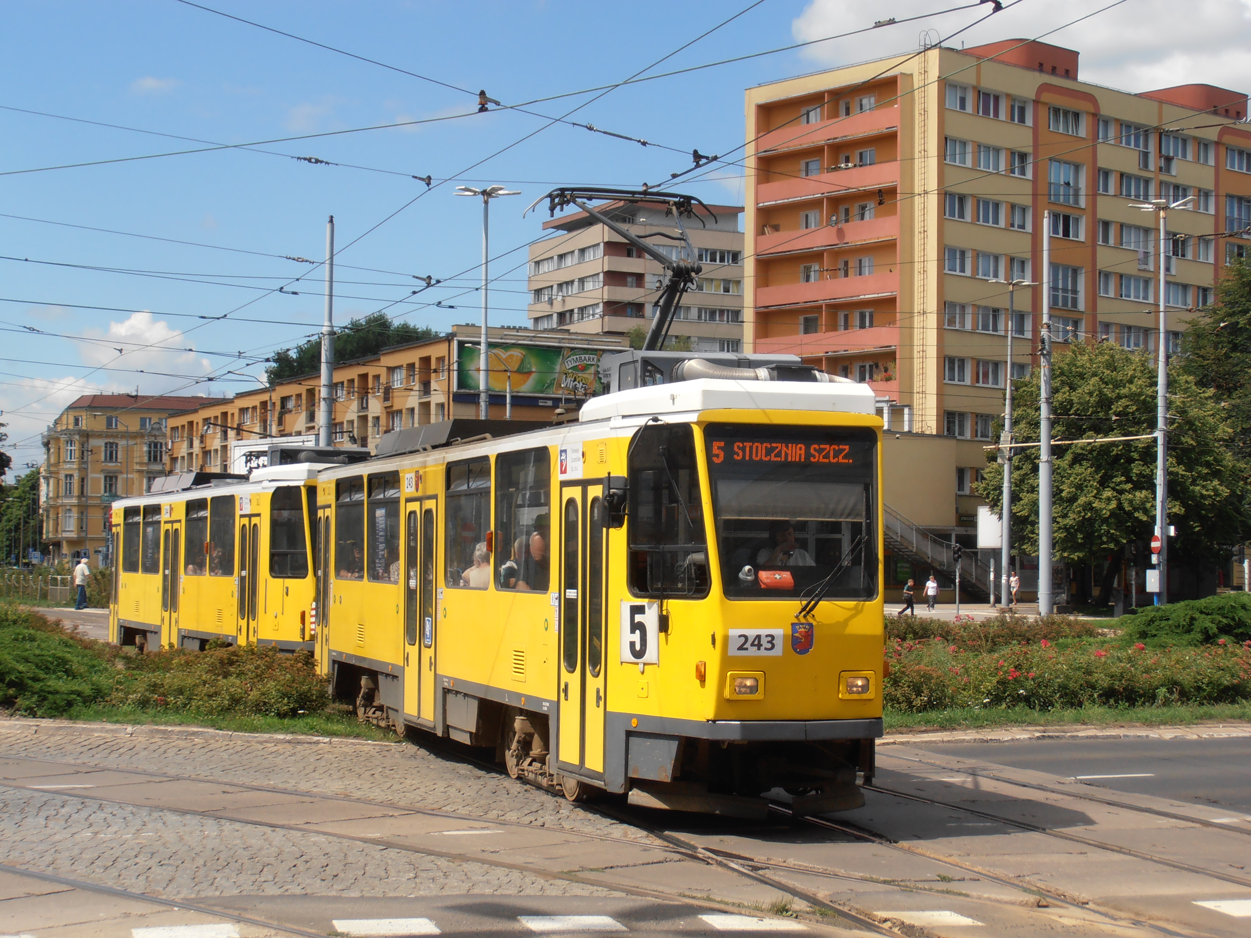 Skład wagonów typu Tatra T6A2D na placu Rodła w Szczecinie, 2018